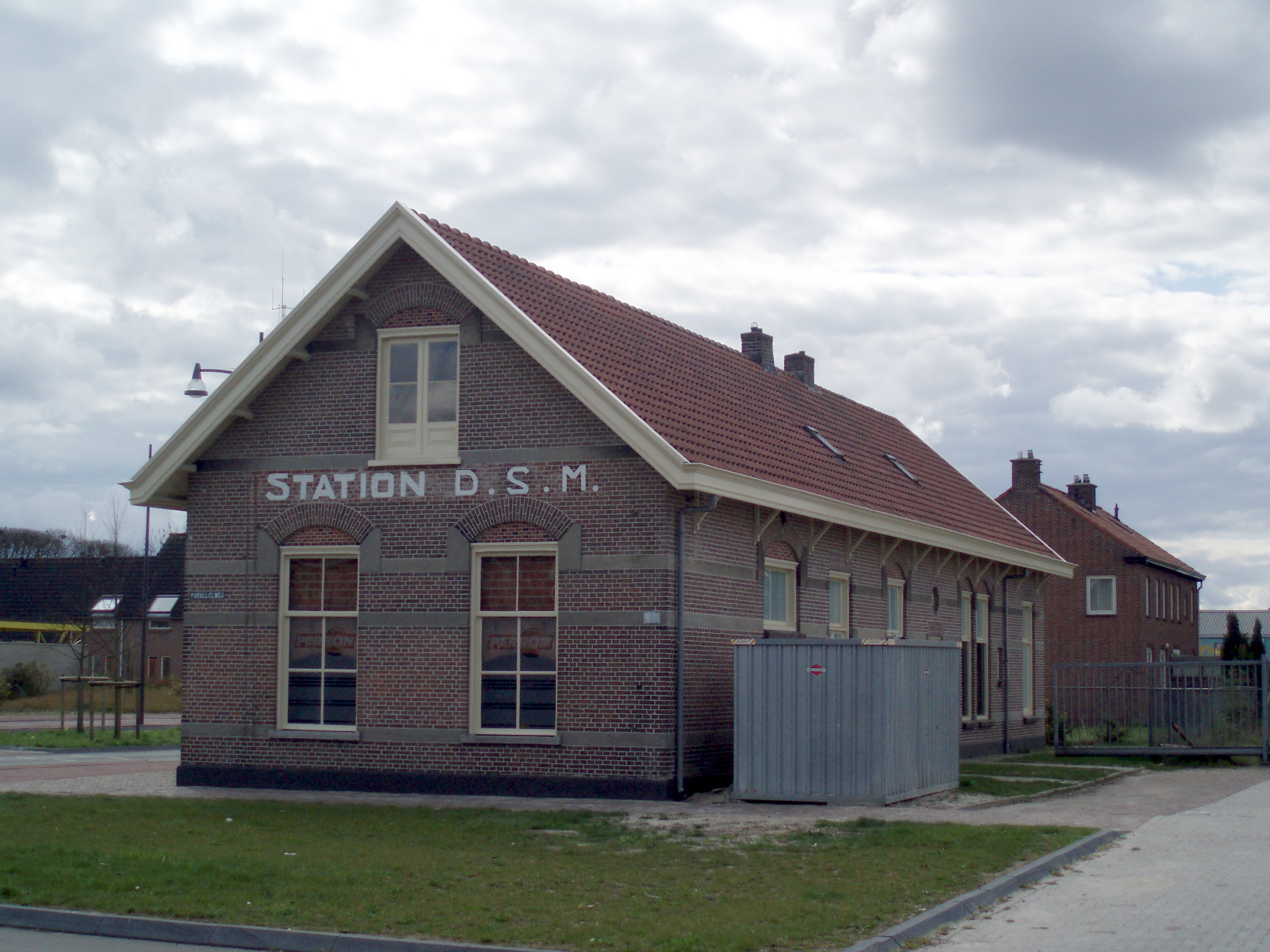 Voormalig station aan de Krimweg van de inmiddels opgeven Dedemsvaartsche Stoomtramweg-Maatschappij te Coevorden.